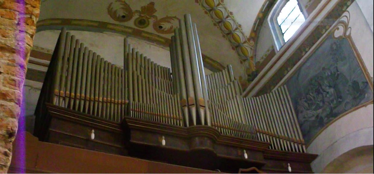 Niearchitektoniczny prospekt organowy w Inowrocławiu. Organy firmy Sauer z Frankfurtu nad Odrą zbudowane w 1934 w Bierutowie.